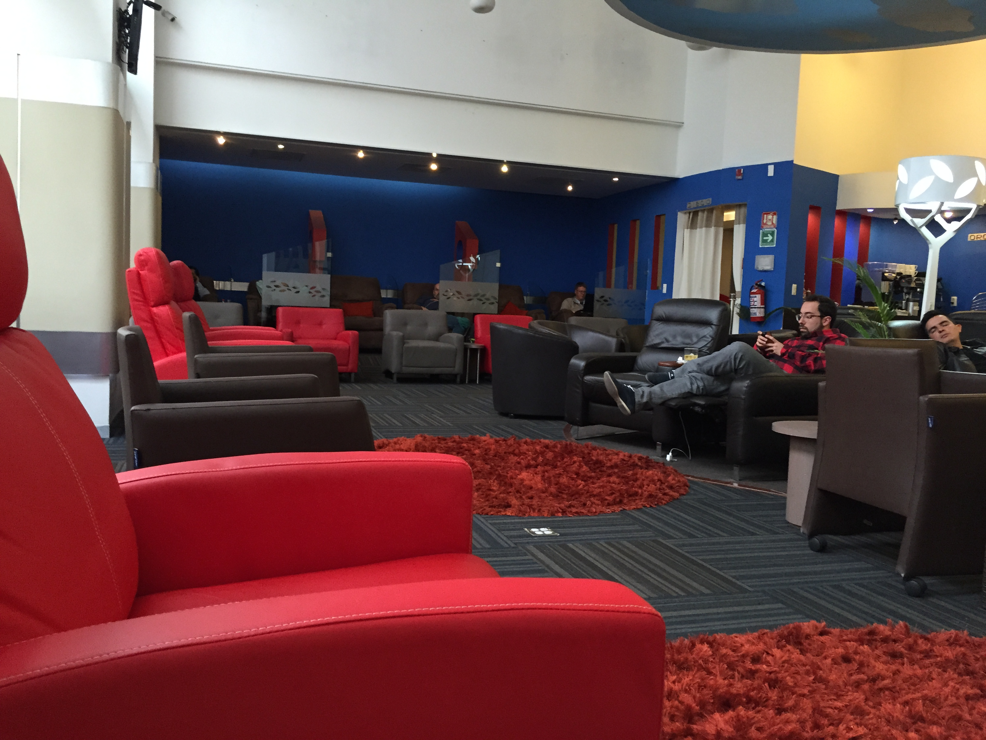 Interior del GRAND Lounge de la T1 del Aeropuerto Internacional de la Ciudad de México.